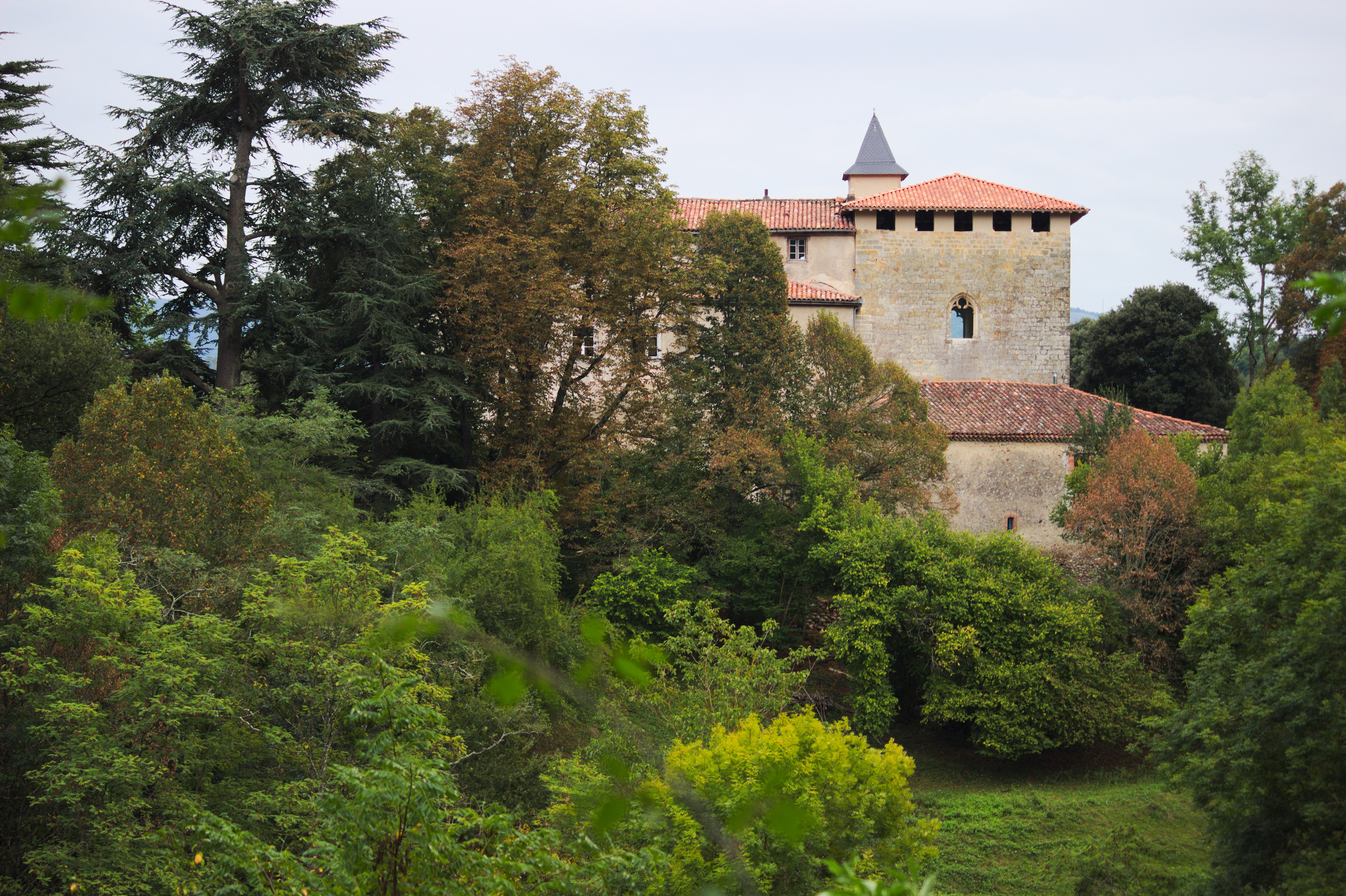 Château de Crampagna